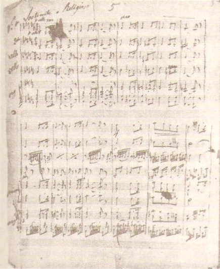 Страница из партитур оперы «Аршак II»